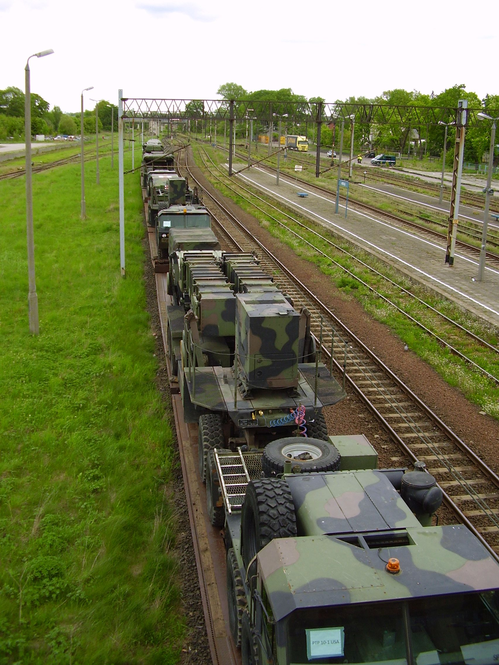 Amerykańskie rakiety w Morągu